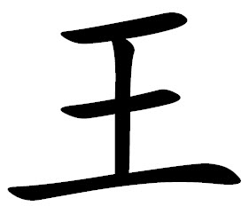 Carácter chino WANG